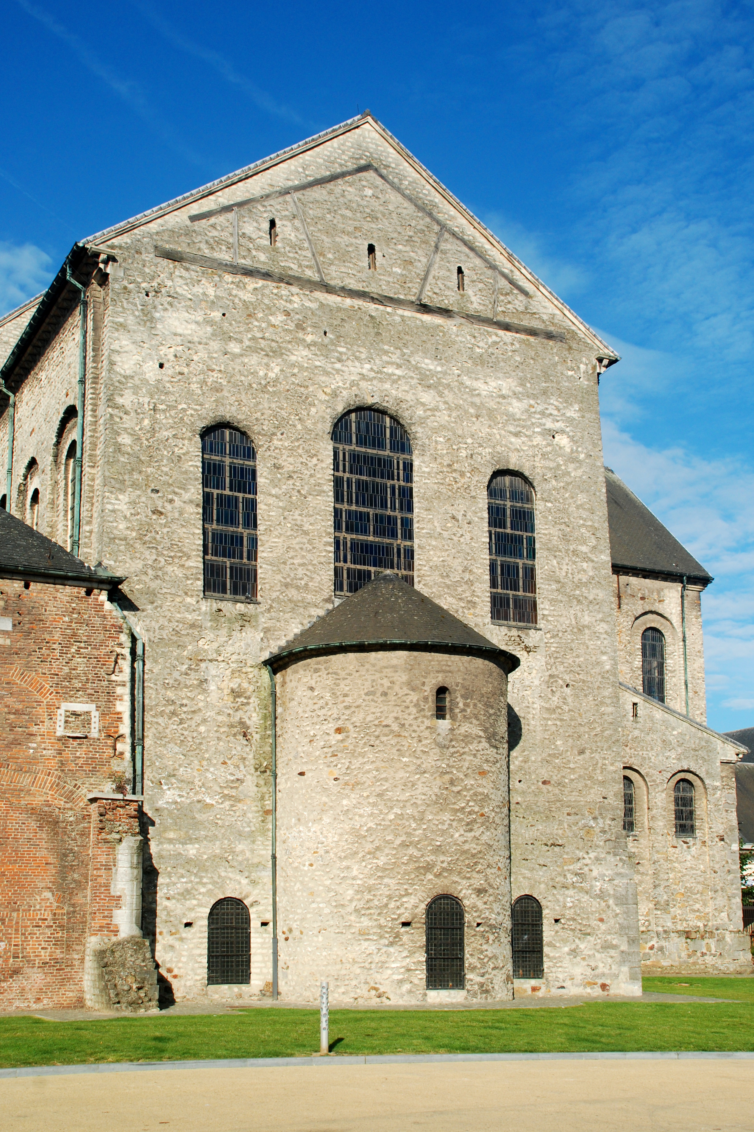 Belgique - Brabant wallon - Nivelles - Collégiale Sainte-Gertrude